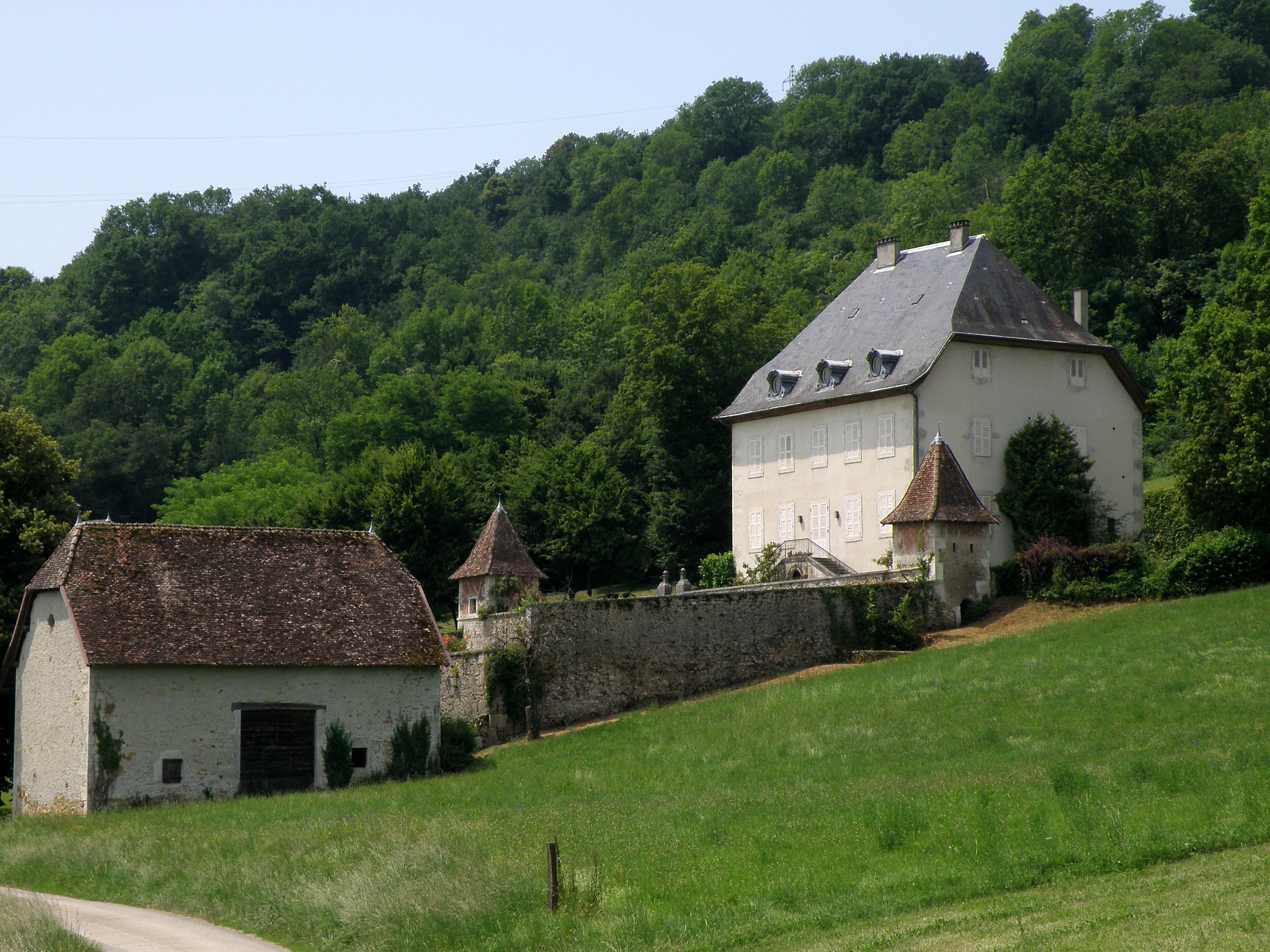 Nattages, comm. du département de l’Ain (région Rhône-Alpes, France), sur la rive droite (occidentale) du Rhône. Château de Marnix, hameau de Marnix, dans le sud-est de la commune.